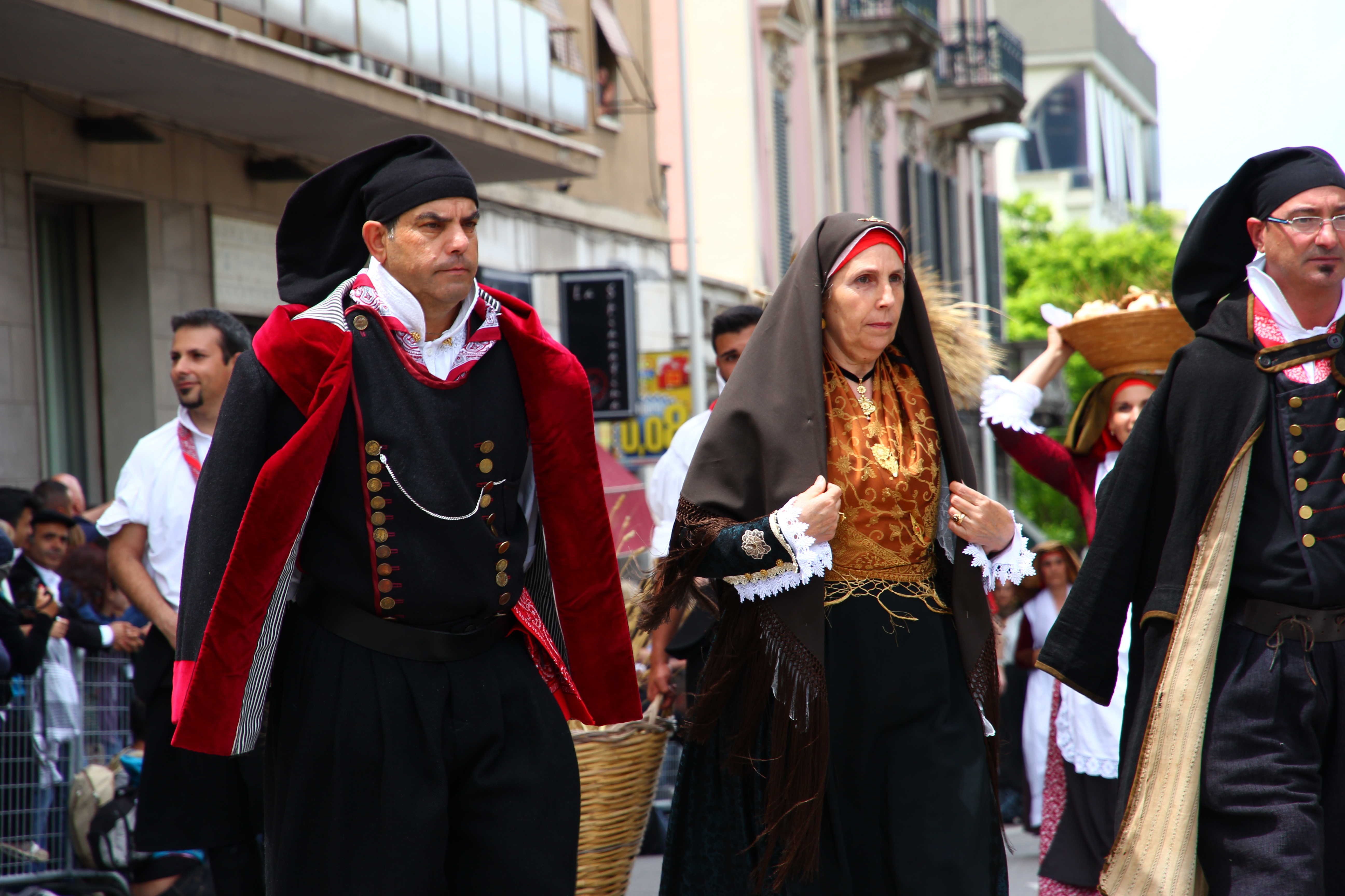 Cavalcata Sarda 2013 (Sassari)